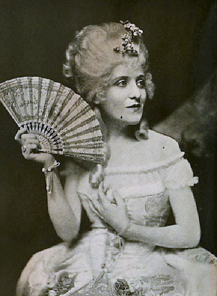 Irene Fenwick